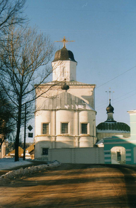 Smolensk. Voznesensky_Monastery. Voznesensky_Sobor